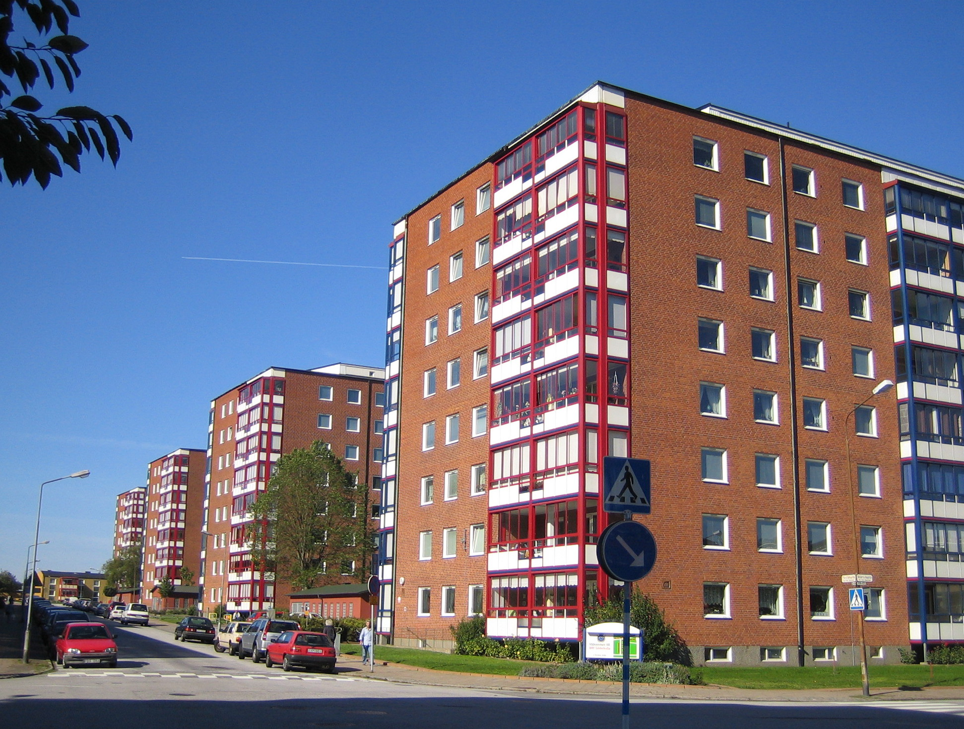 Söderkulla, Malmö, Sweden